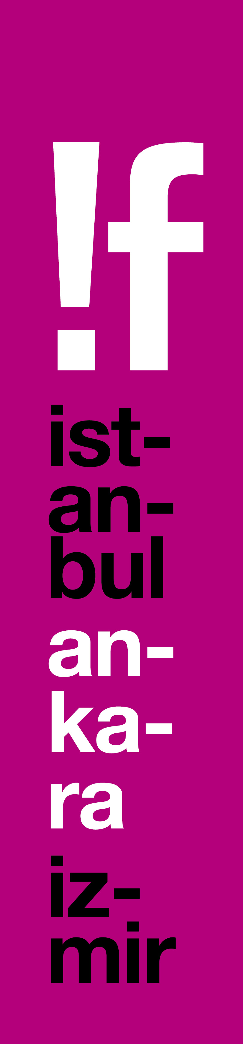 AFM Uluslararası Bağımsız Filmler Festivali'nin Logosu